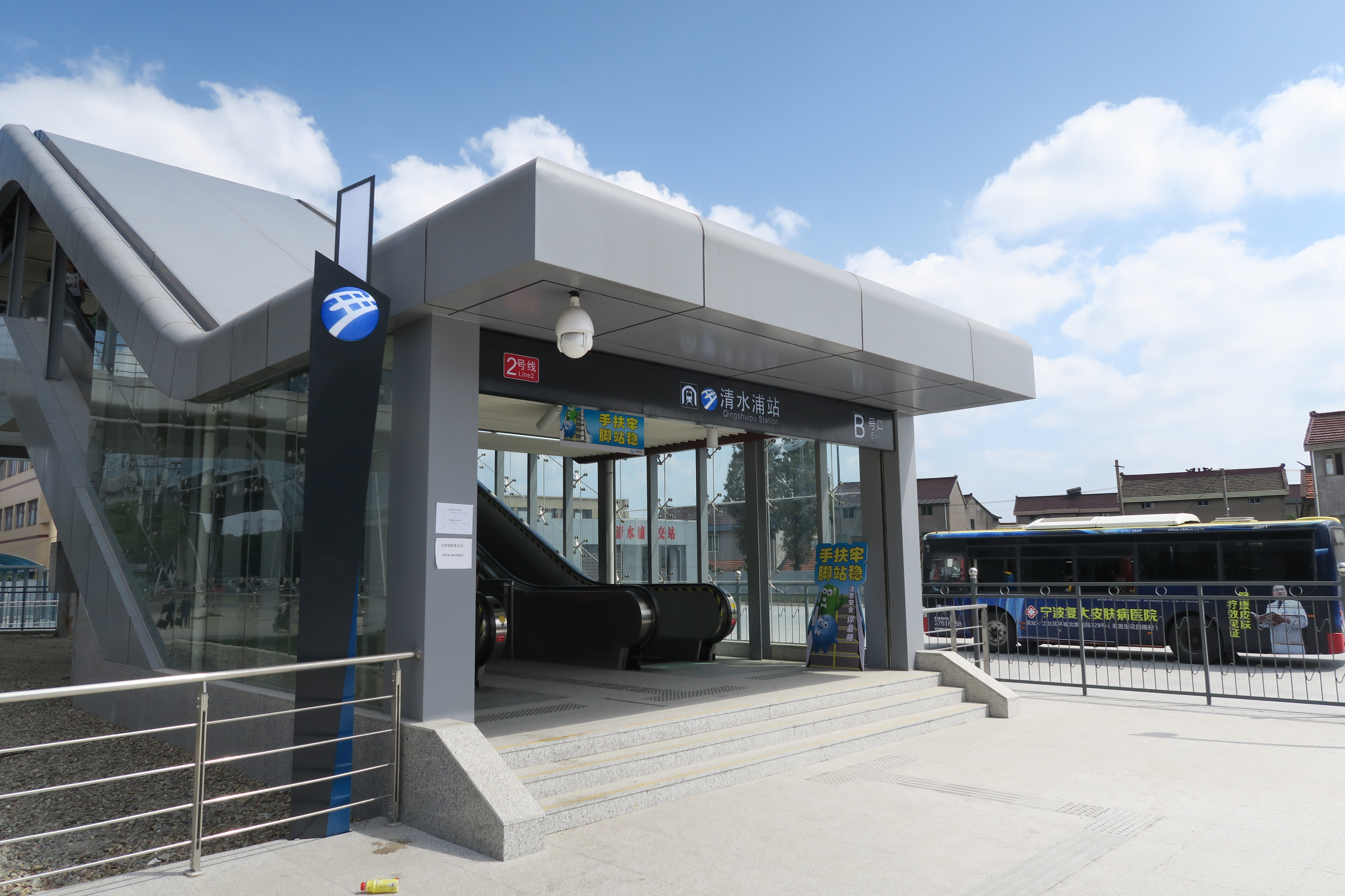 宁波地铁清水浦站